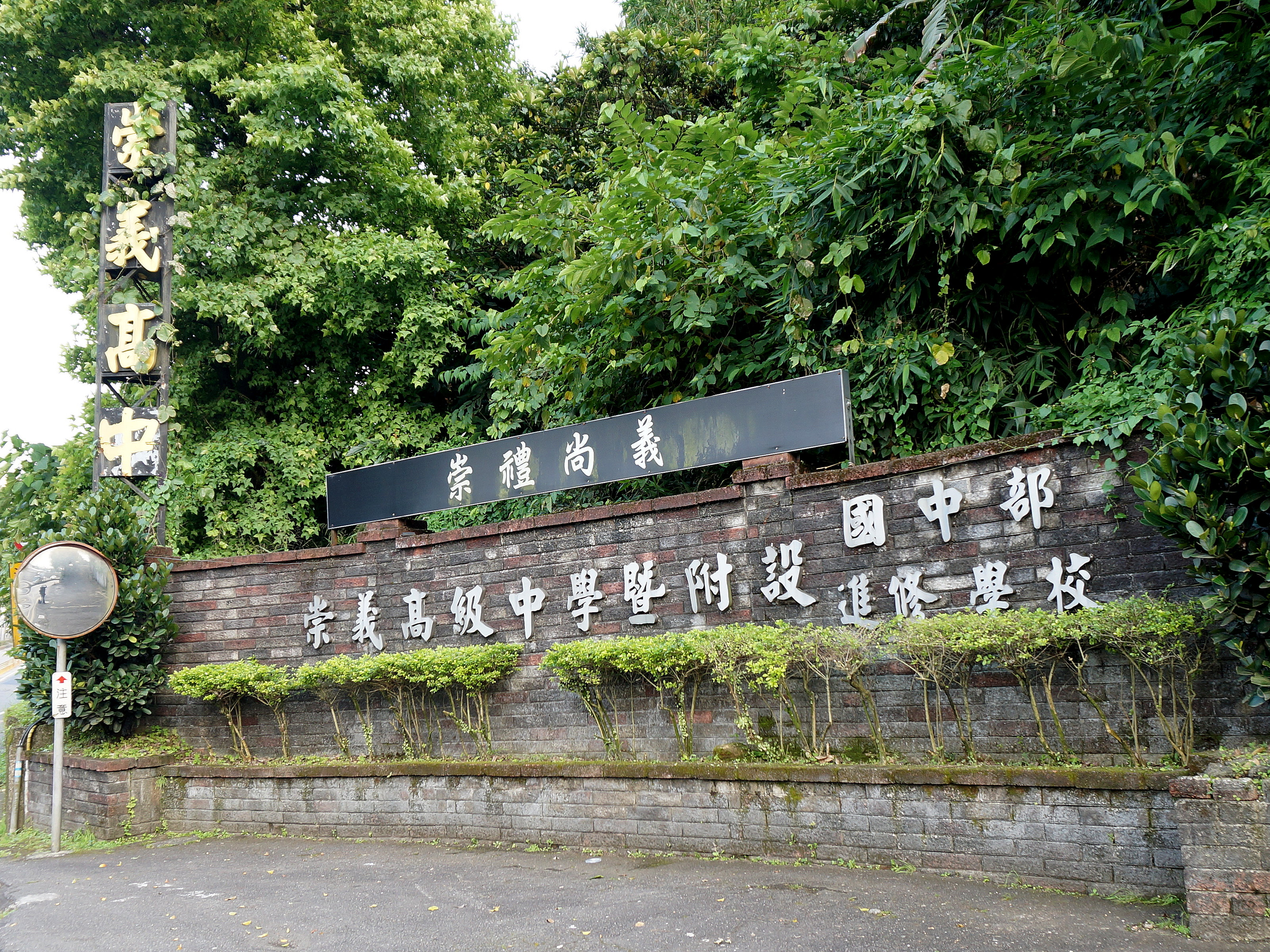 新北市私立崇義高級中學大門前，校名鑄字招牌。